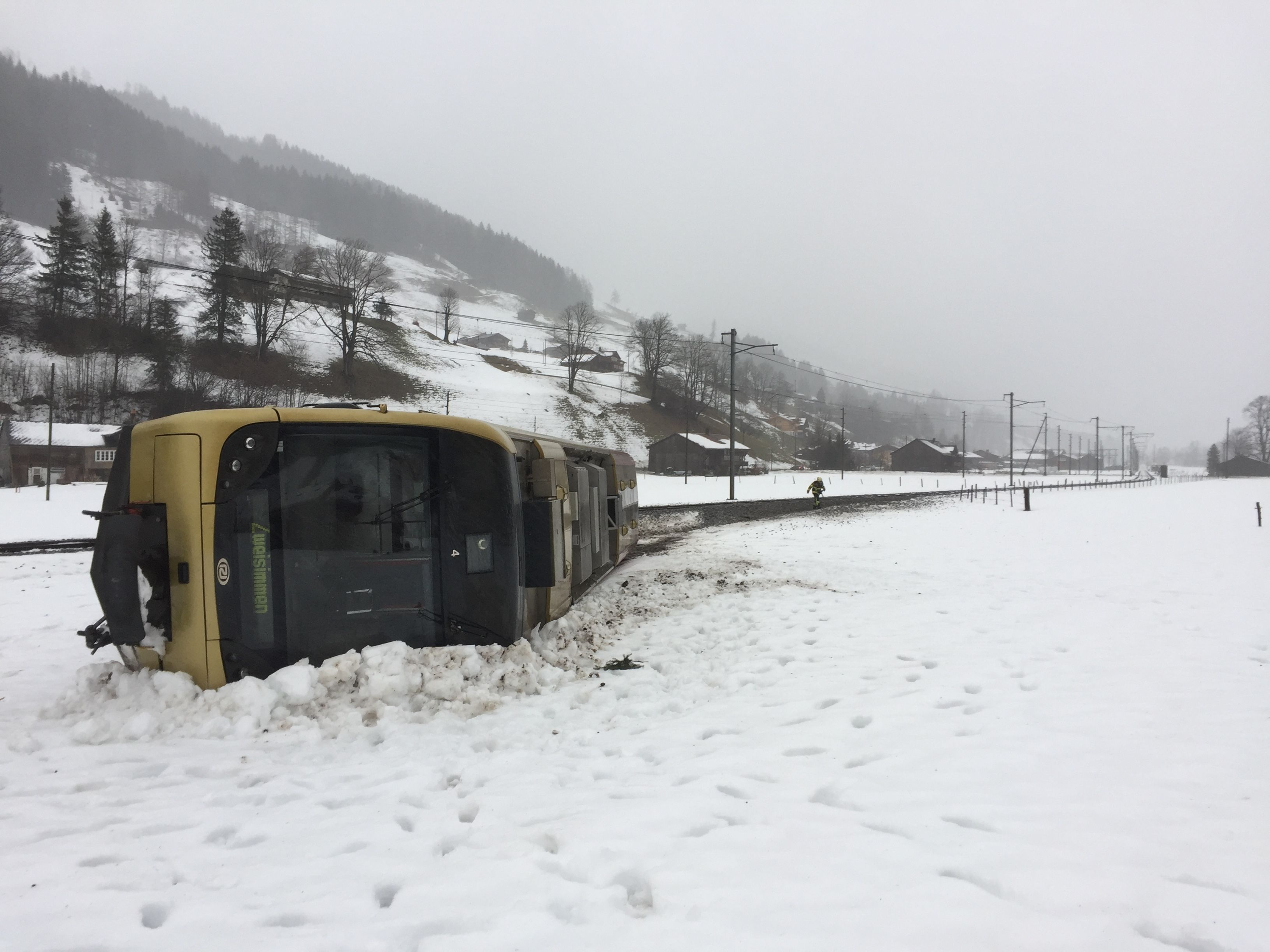 Am 3. Januar 2018 entgleiste bei Lenk ein Steuerwagen der Montreux-Berner-Oberland-Bahn (MOB), der von einer starken Windböe des Sturmtiefs Burglind erfasst wurde. Acht Passagiere wurden verletzt, die meisten davon leicht.